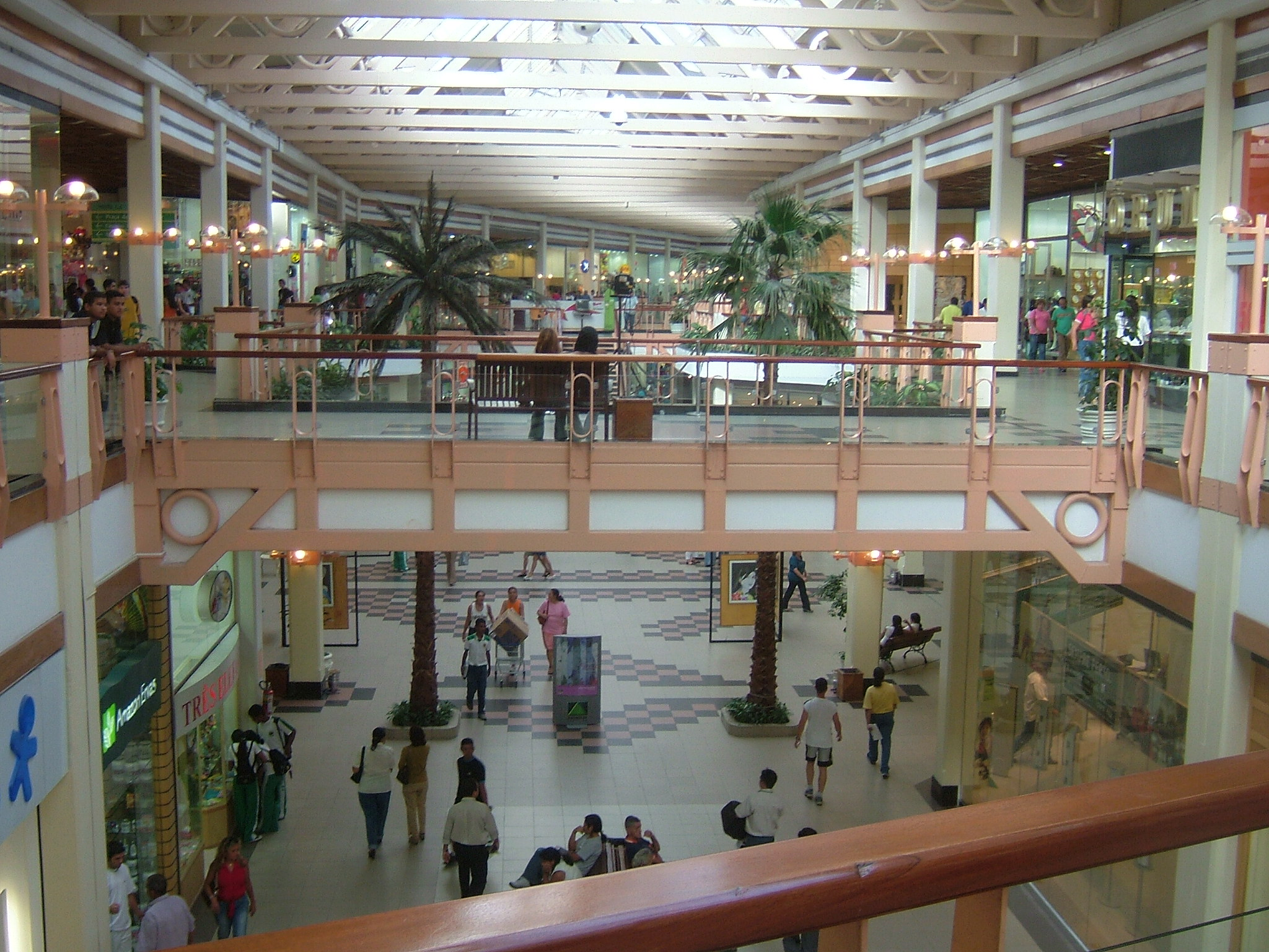 Amazonas Shopping Mall Manaus Brasil